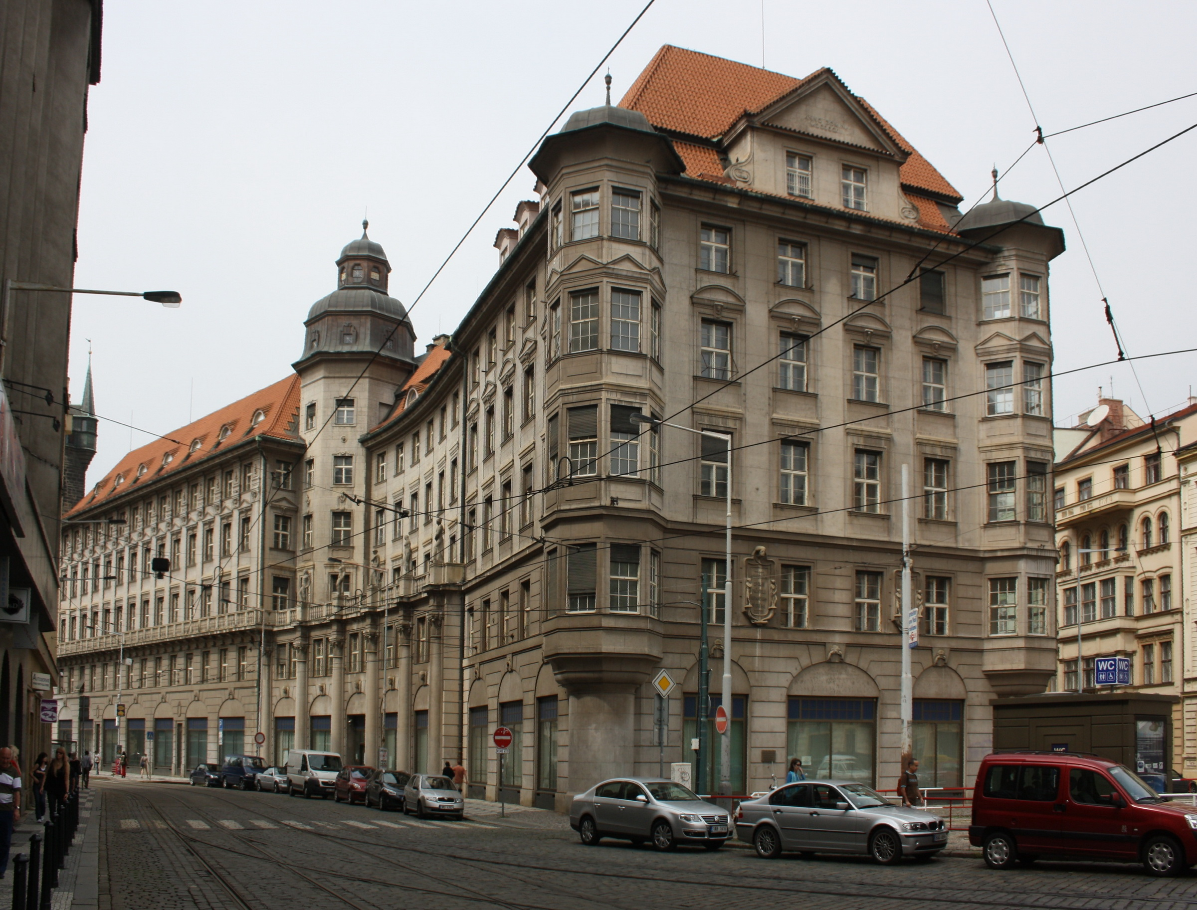 Pohled od jihovýchodu.